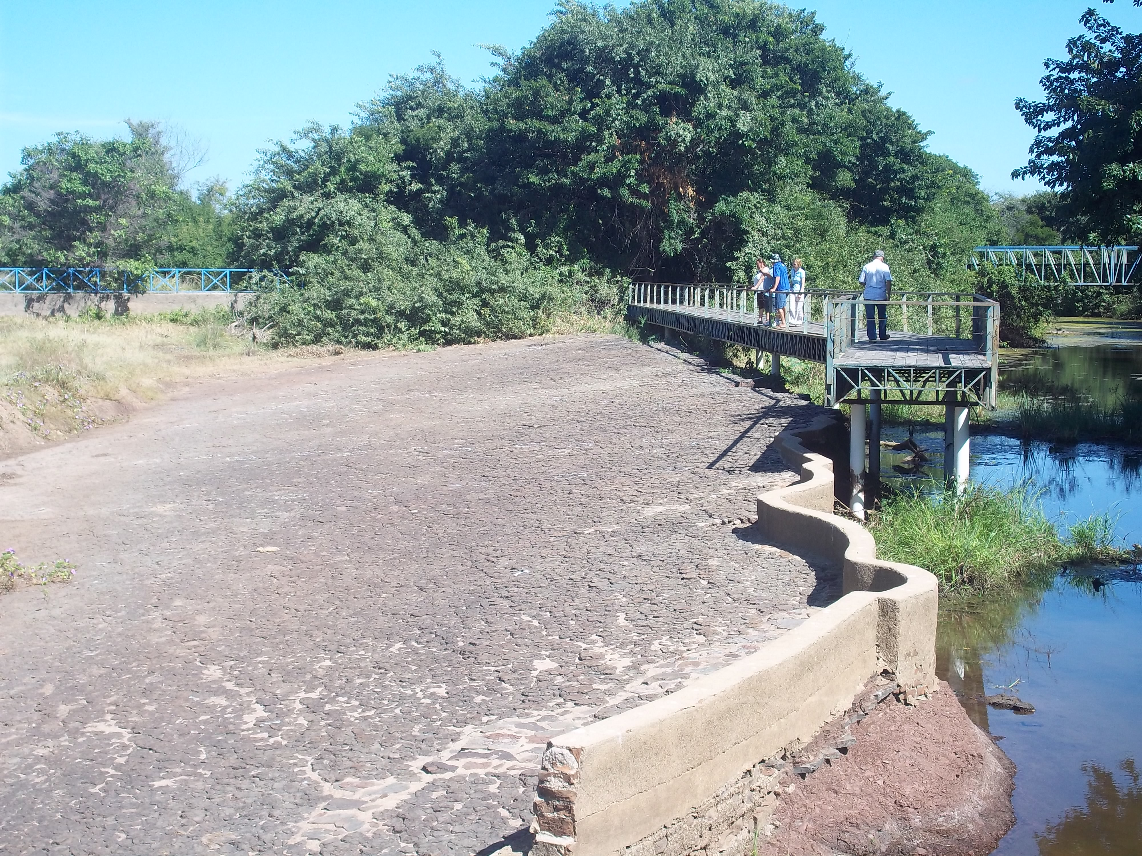 Vista do local da onde estão localizadas as pegadas fossilizadas no Vale dos Dinossauros.